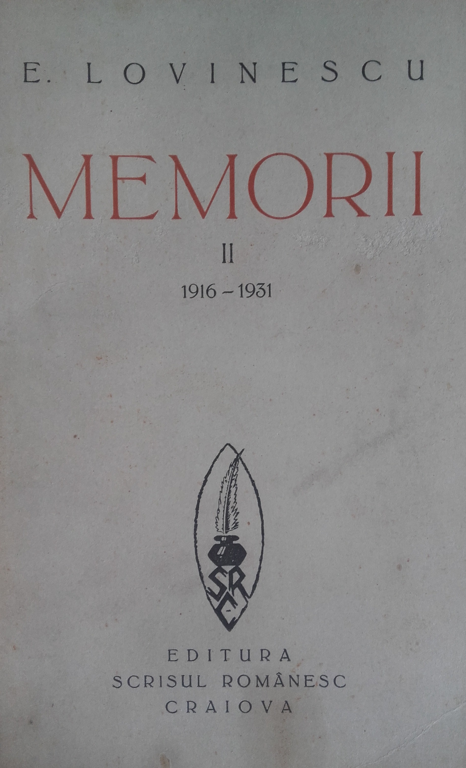 Coperta unuia dintre volumele de „Memorii”